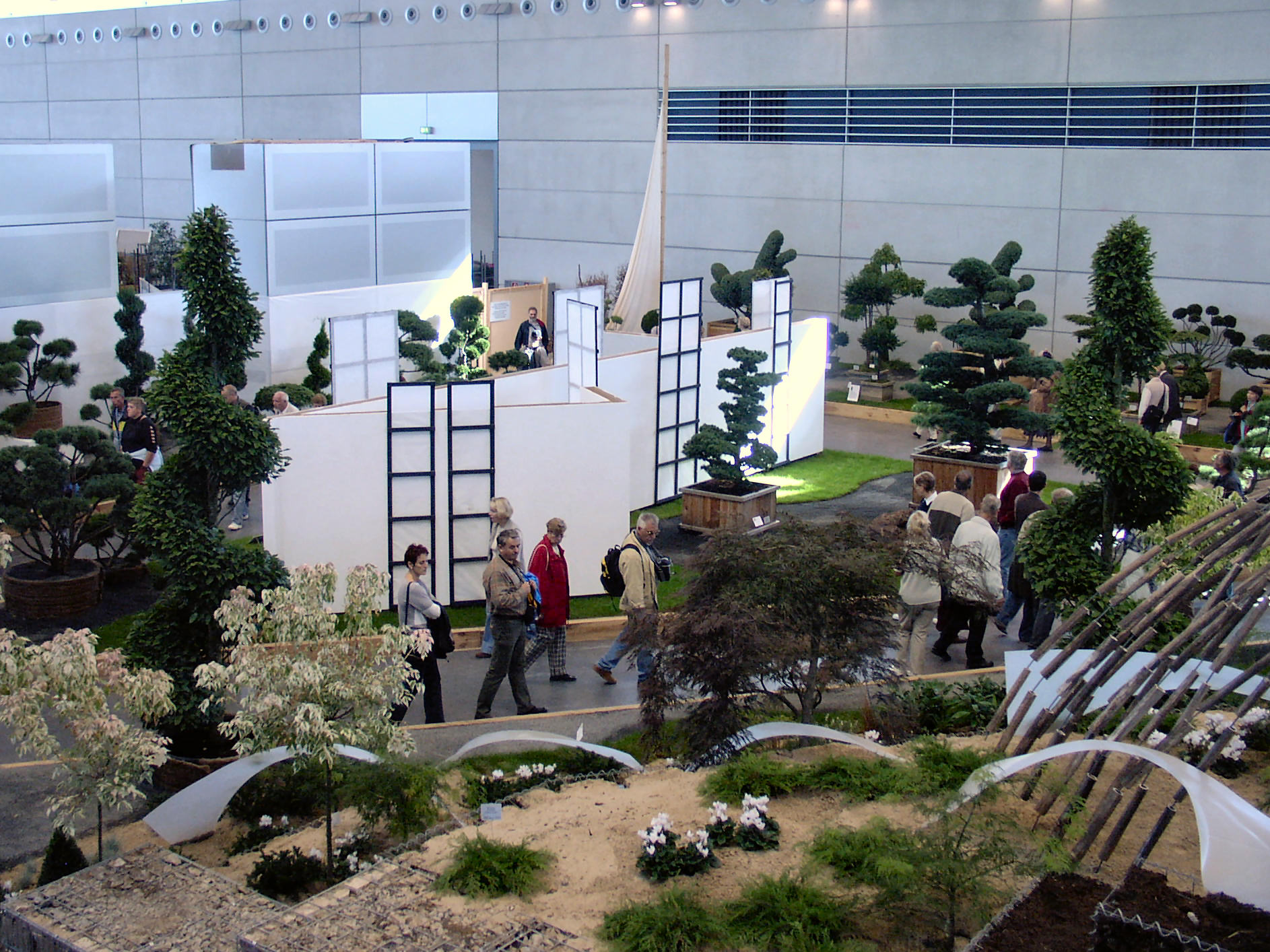 IGA 2003 in Rostock Schmarl, Ausstellungen in der Messehalle